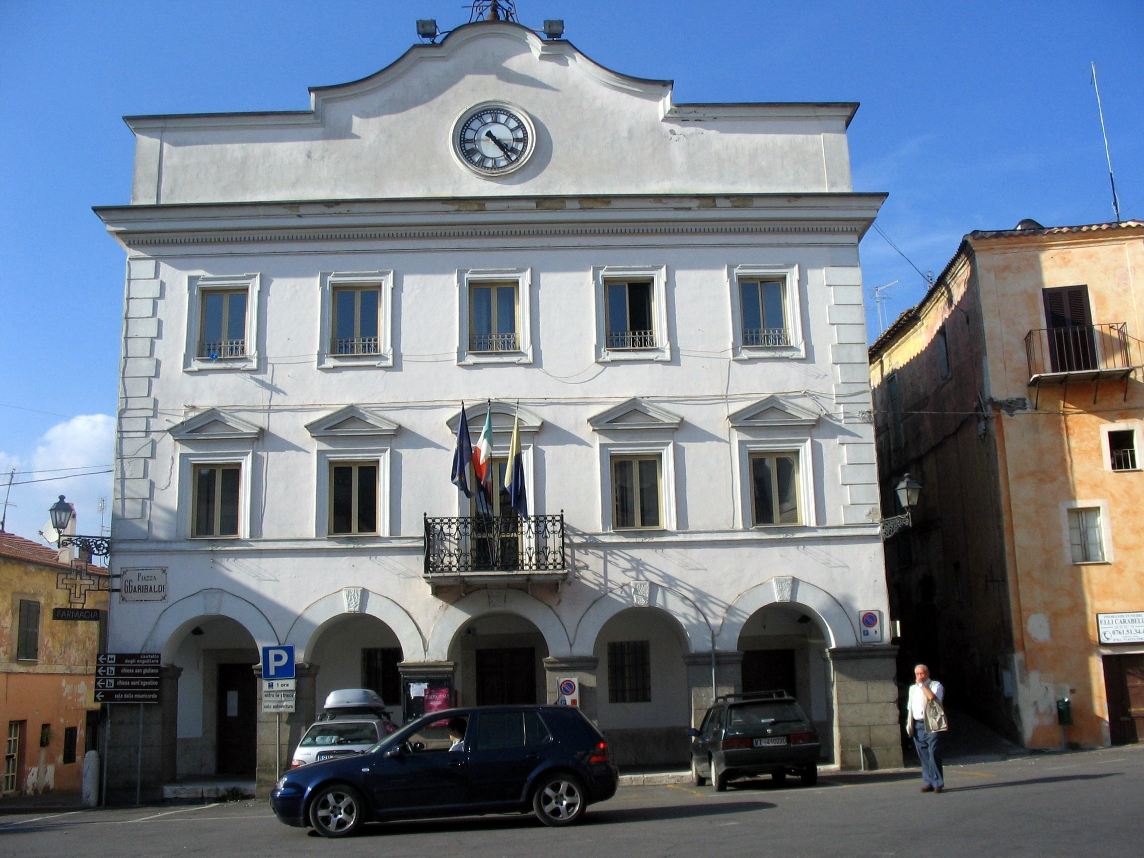 Faleria, Lazio, Italia